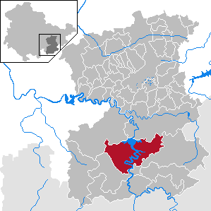 Saalburg-Ebersdorf in Thuringia - Saale-Orla-Kreis